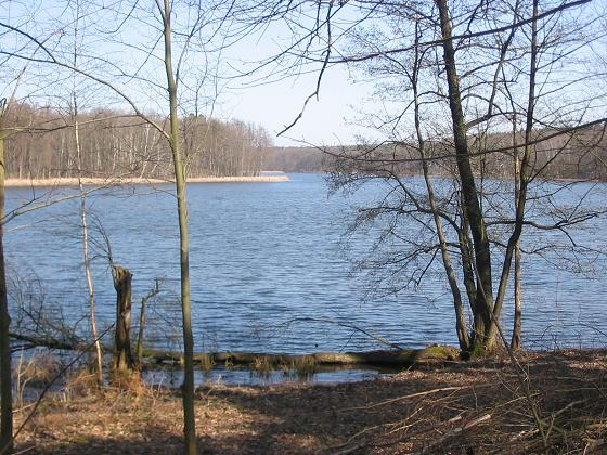 Grunewaldsee, Berlin (Südufer) fotografiert im März 2005 von Lienhard Schulz